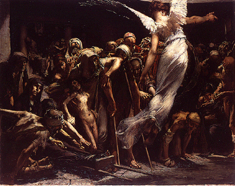 William Laparra, La piscine de Bethsaïda, 1898, Paris, Ecole Nationale Supérieure des Beaux-Arts